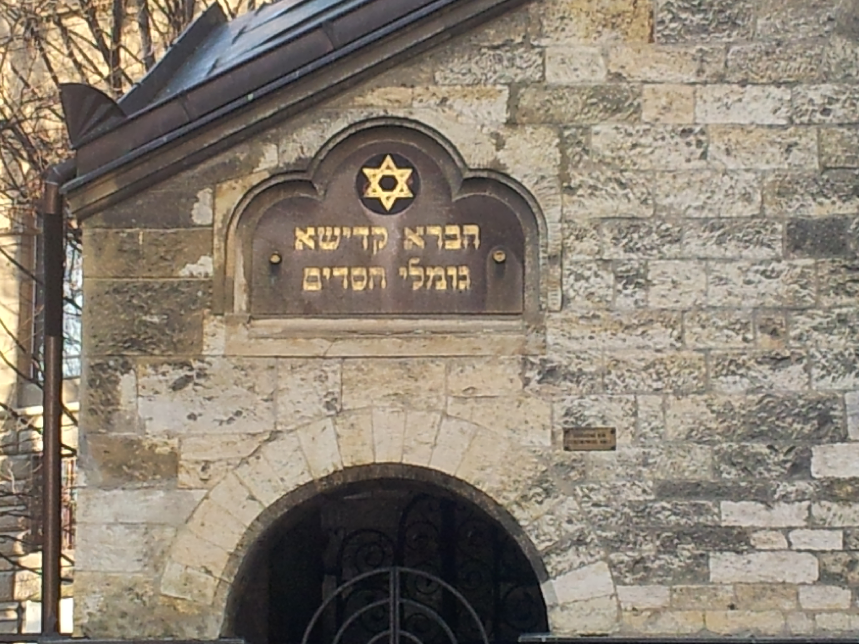 Hevra kaddisha au dessus de l'entrée de l'ancienne salle de cérémonie à Prague dans le quartier de Josefov.